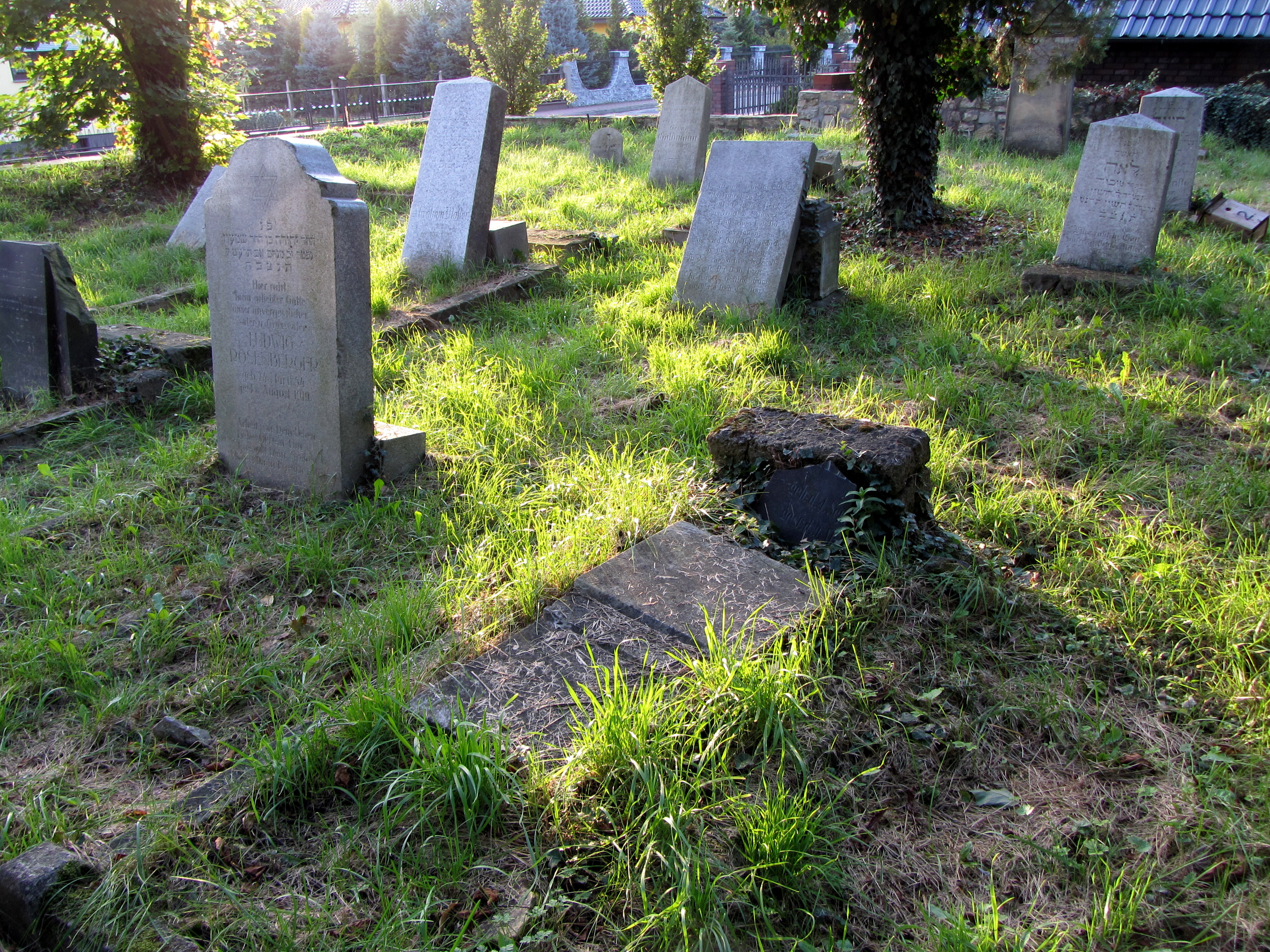 Gogolin, cmentarz żydowski, kon. XIX